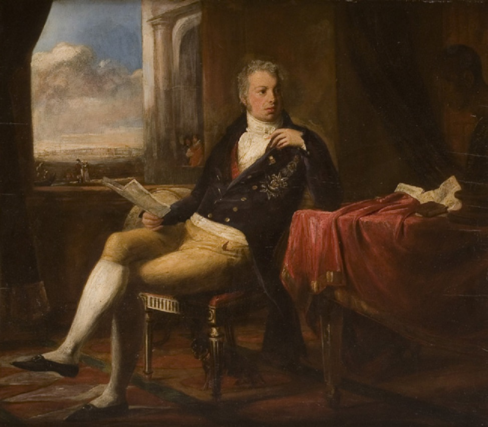 Pintura a óleo de D. Domingos Xavier de Lima, 7.º Marquês de Nisa (1765-1802), almirante e diplomata, no Museu de Marinha. Note-se que existe um desenho do mesmo ano na Biblioteca Nacional de Portugal que serviu como estudo.